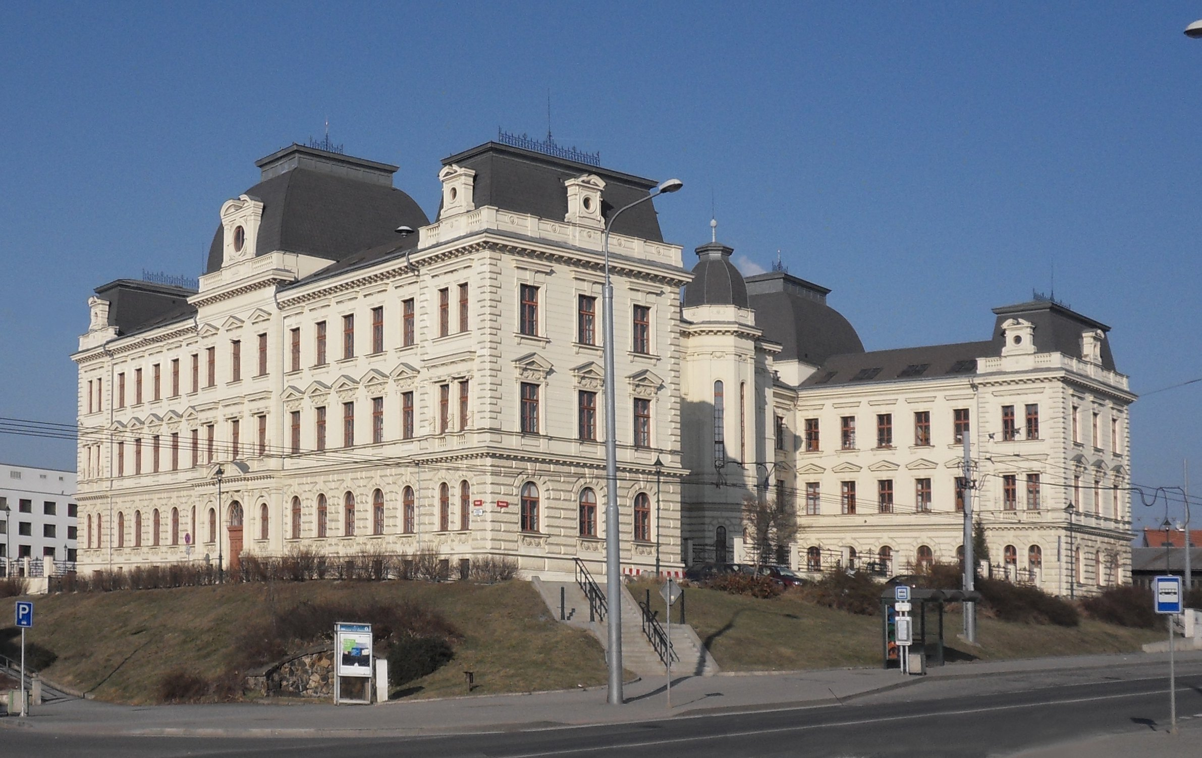 Budova okresního soudu Plzeň-město, pohled ze Šumavské ulice